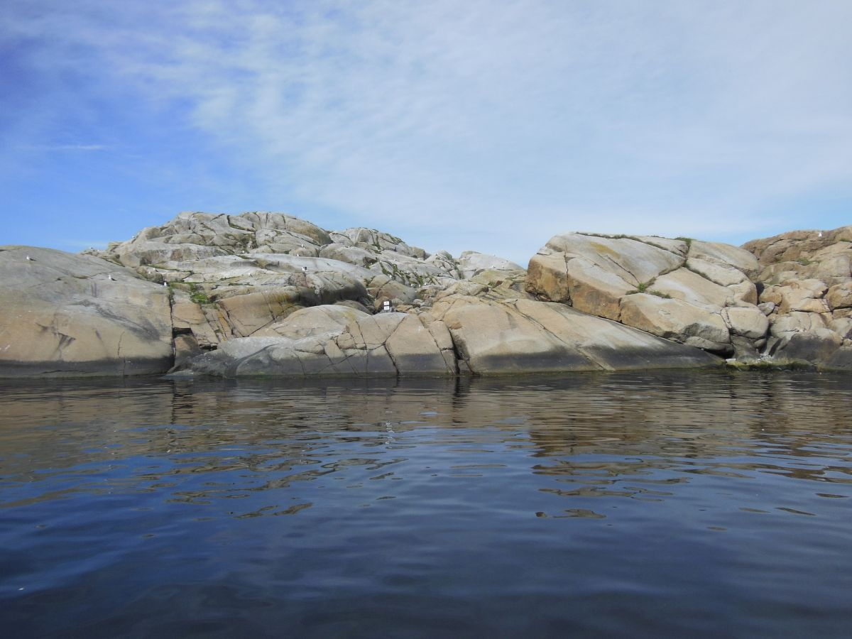 Strømsundholmen sett fra sundet mot hovedøya Svenner.